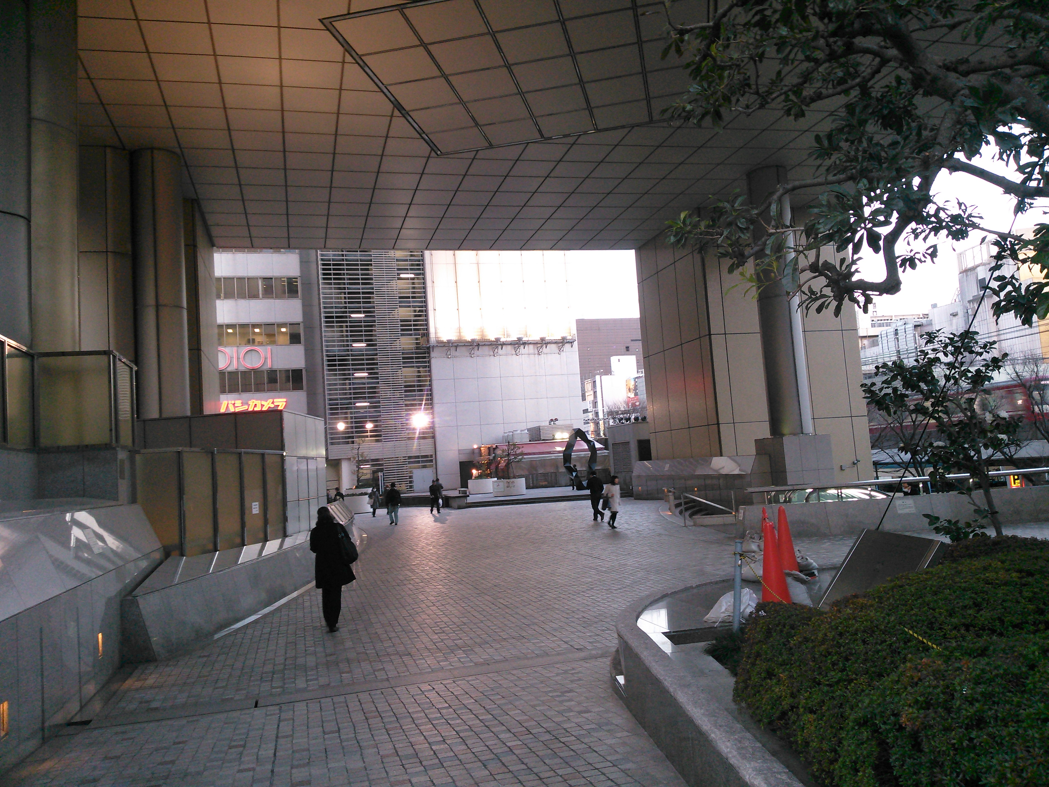 神奈川県川崎市川崎区日進町、興和川崎東口ビル